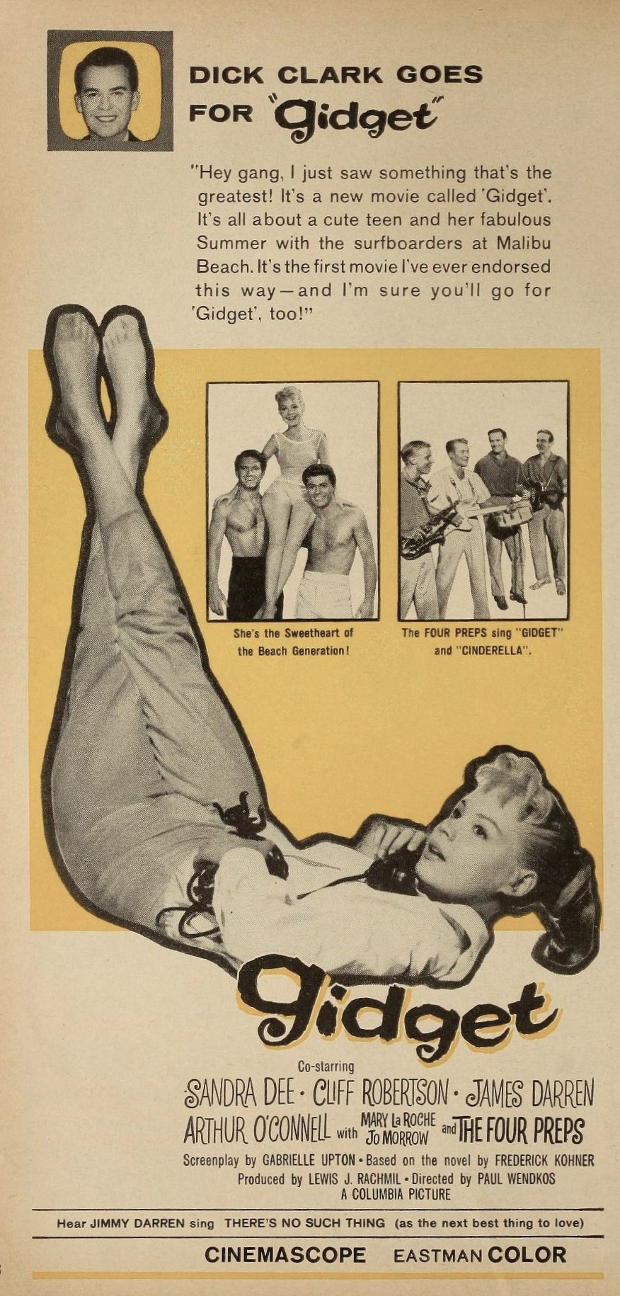 Sandra Dee, Cliff Robertson, and James Darren in Gidget, 1959